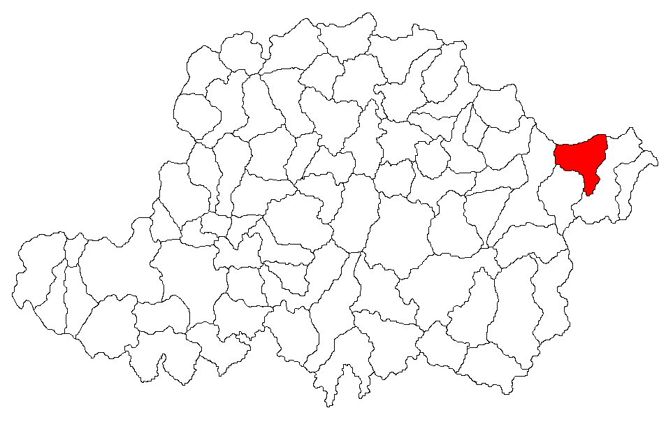 Categorie:Hărţi ale judeţului Arad